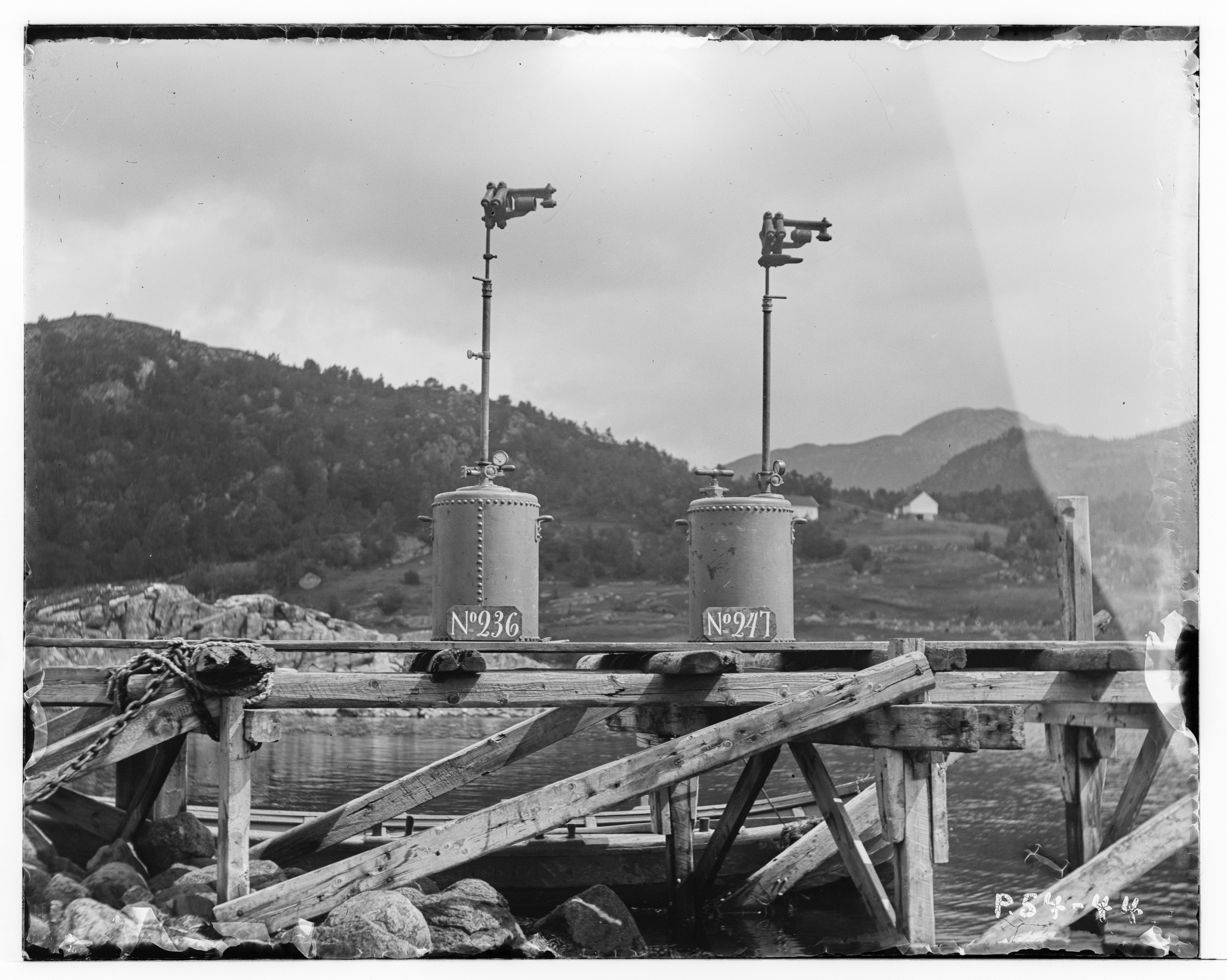 Bildet er hentet fra Arkivverket. Wells light nr. 236 og 247 Arkivinstitusjon : Riksarkivet Arkivnavn : Havnedirektoratet Sted : Norge, Ukjent, Ukjent, Emneord: Havneutbygging Avbildet